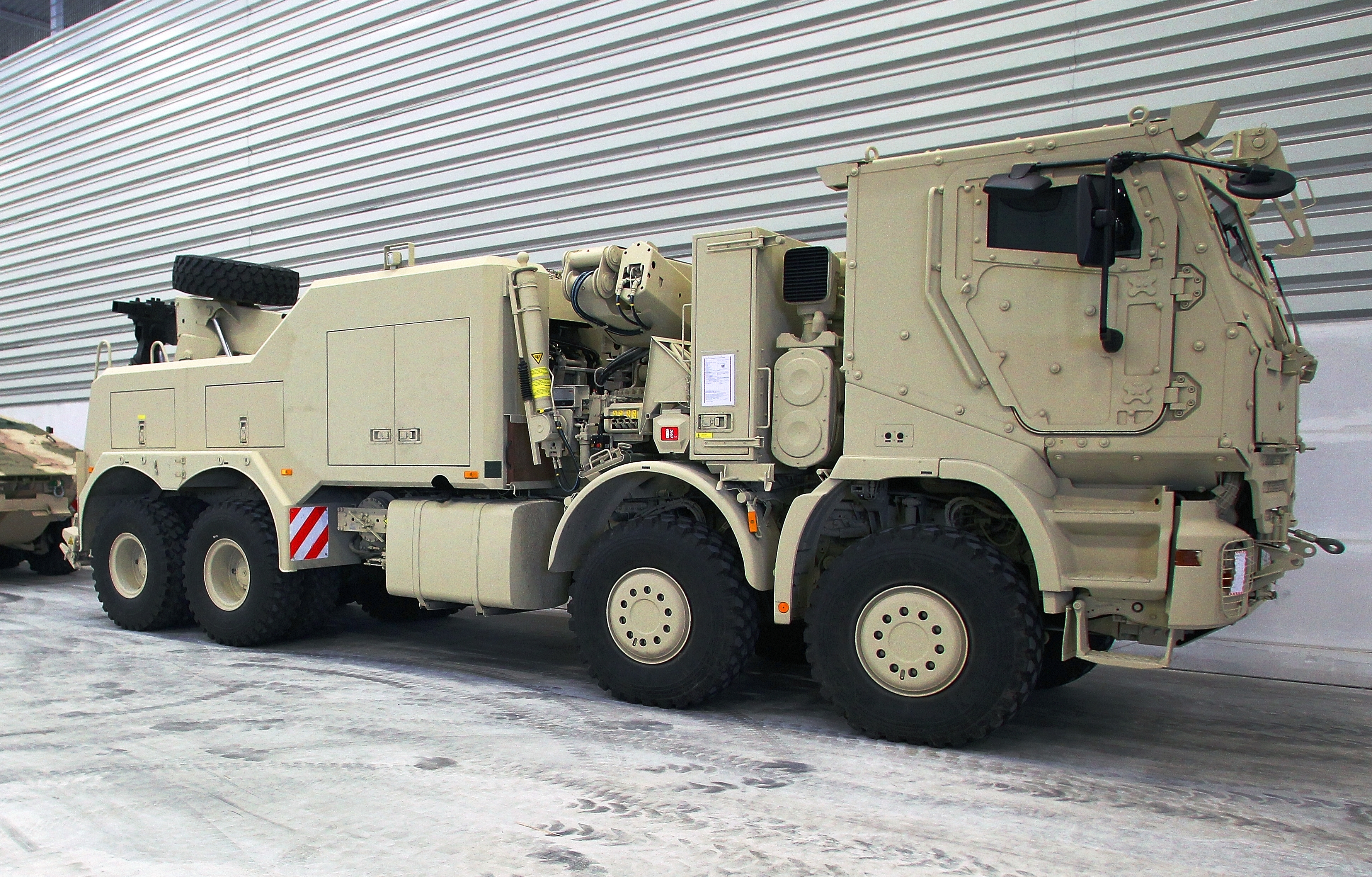 Das schwere geschützte Berge- und Abschleppfahrzeug Bison.